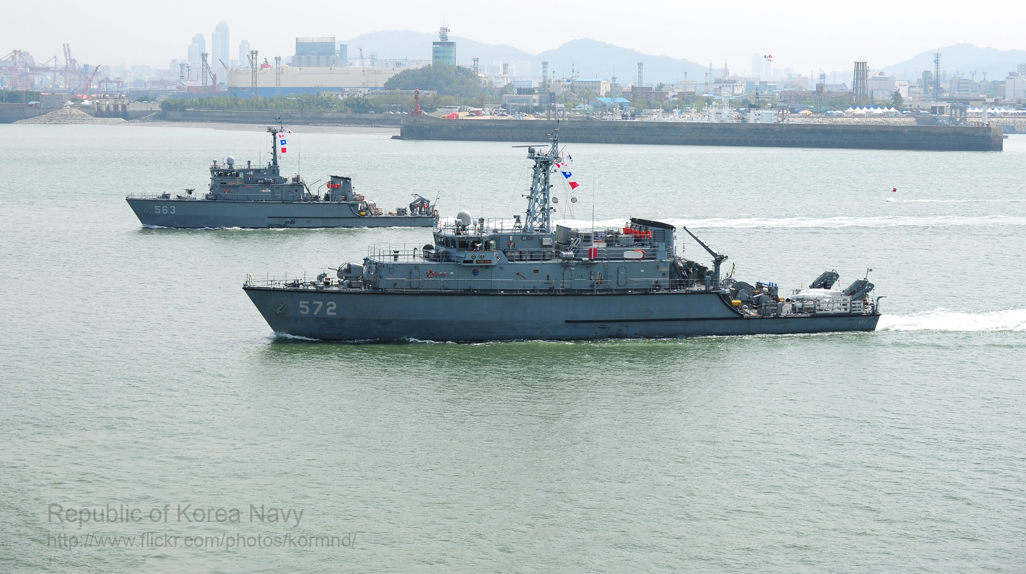 12. 9.15. 제62주년 인천상륙작전 전승행사에서 촬영한 사진입니다 촬영자 : 강진욱, 김상근, 이해환, 장우성, 서준혁. 강정은, 손정민